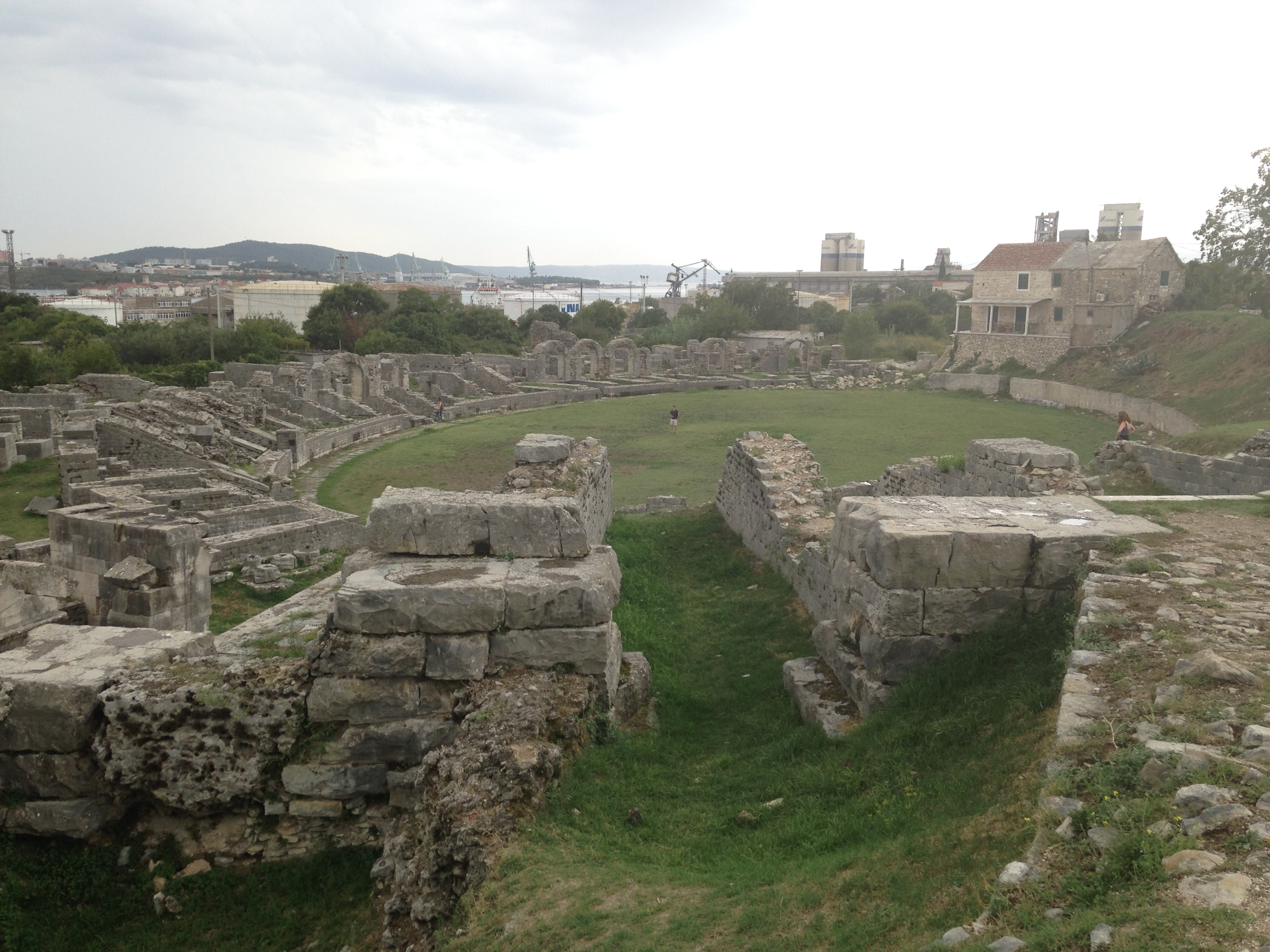 Solin